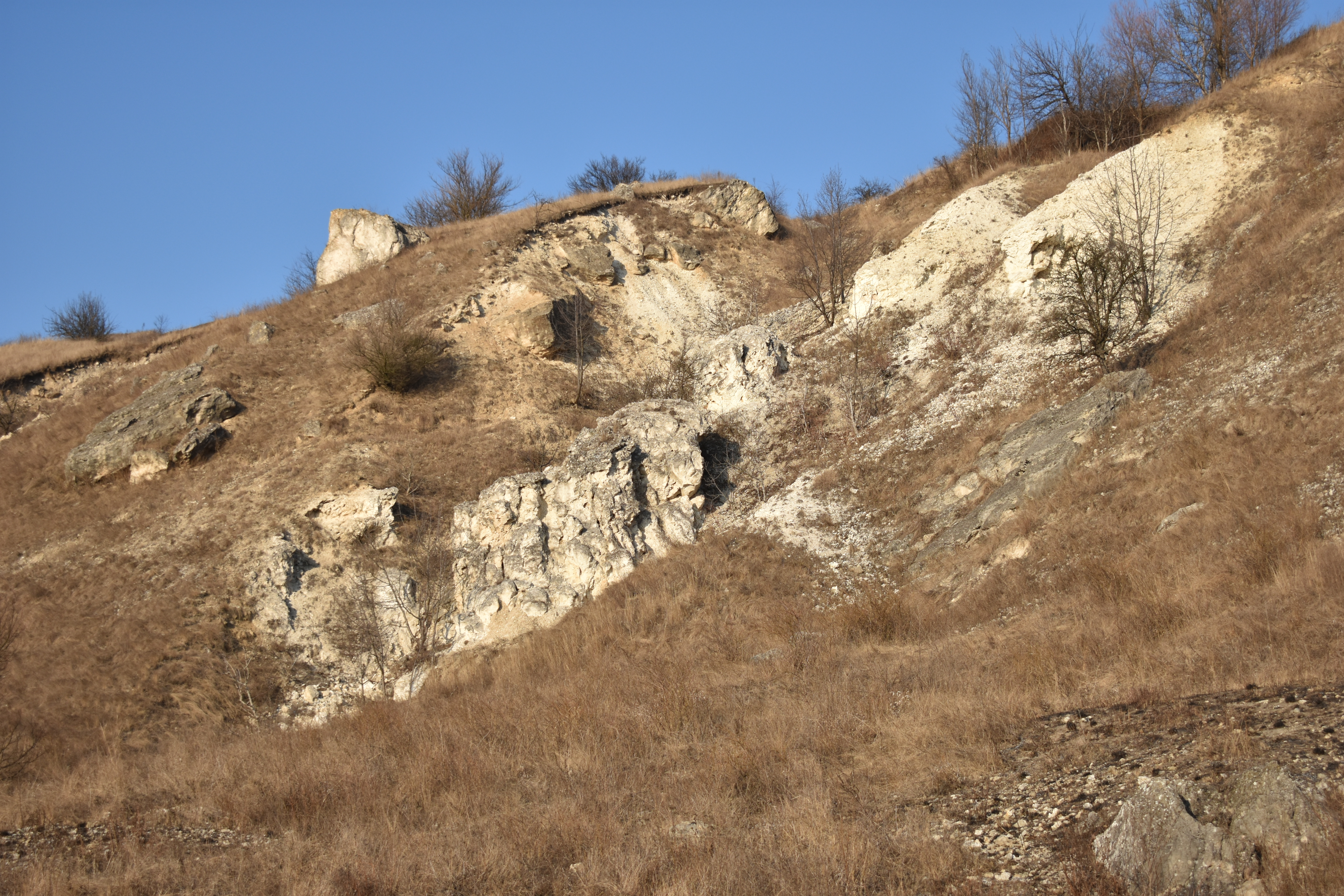 Схили регіонального ландшафтного парку "Дністер" в околицях міста Могилів-Подільський